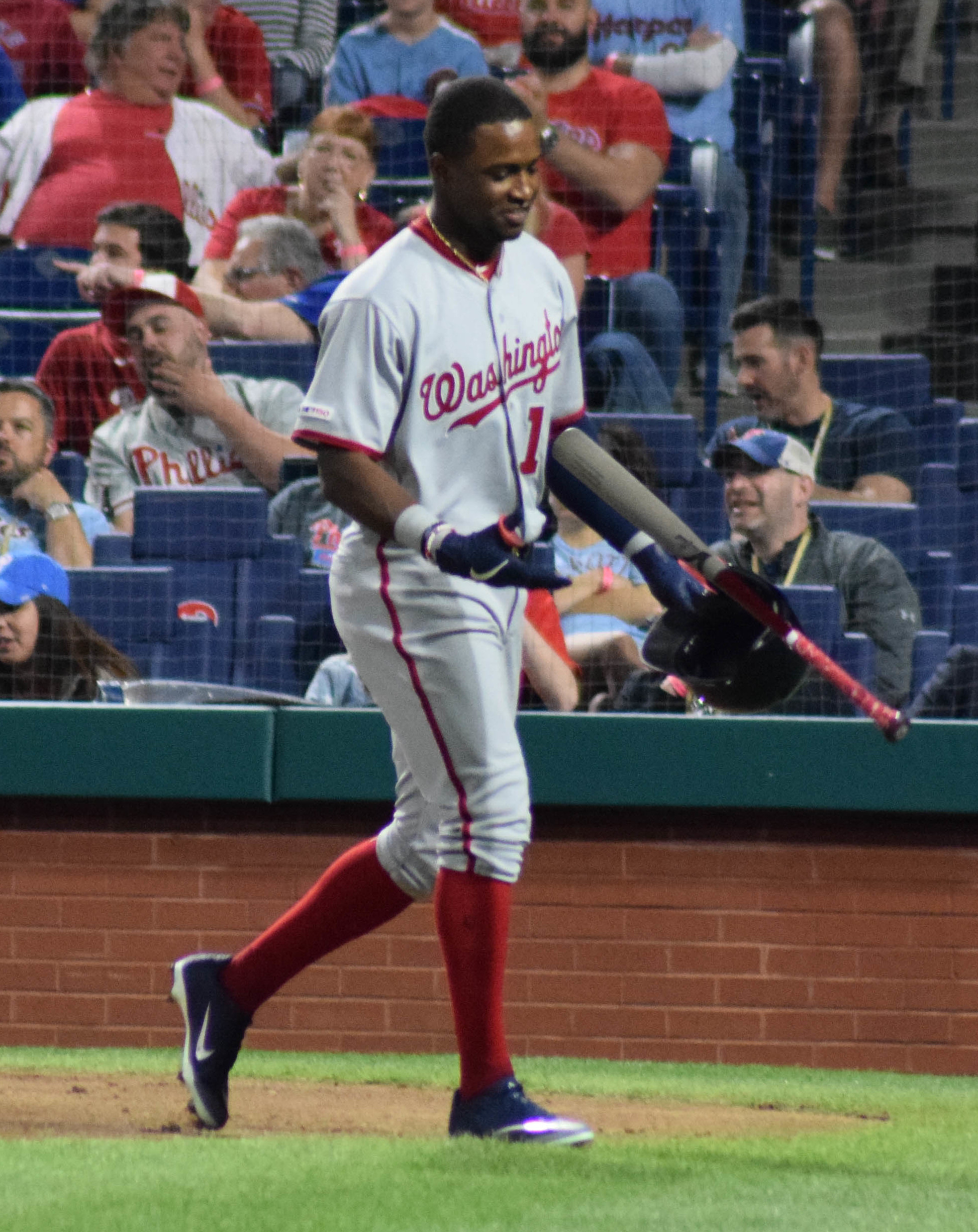 Wilmer Difo